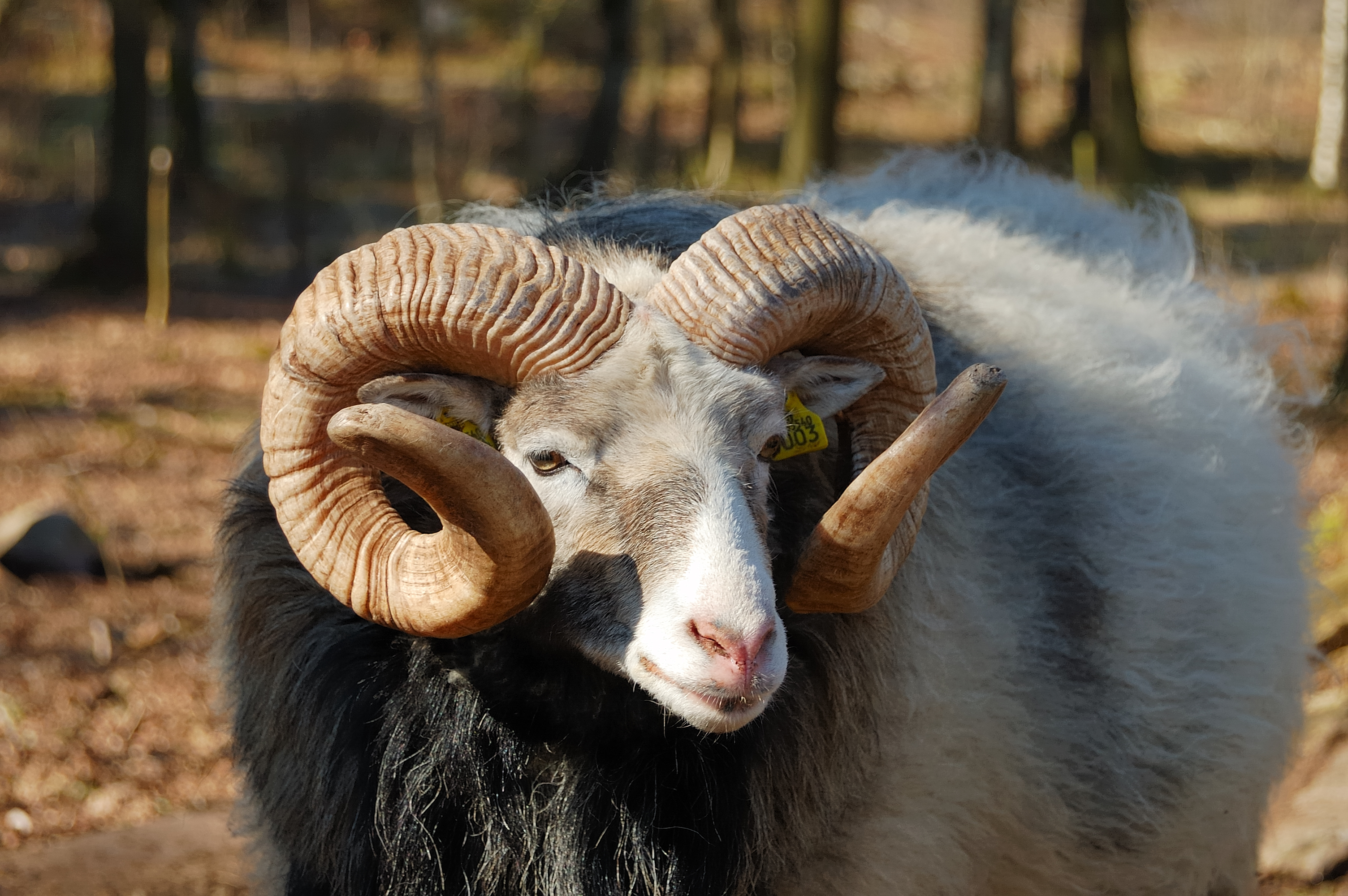 Gutebagge